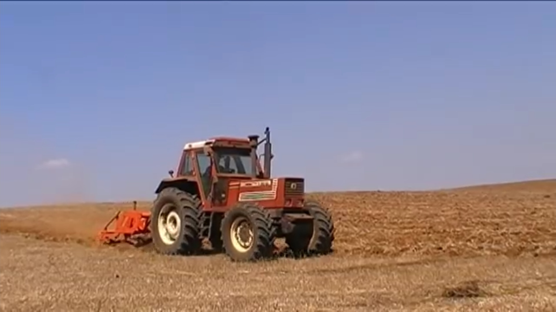 Work in the nature